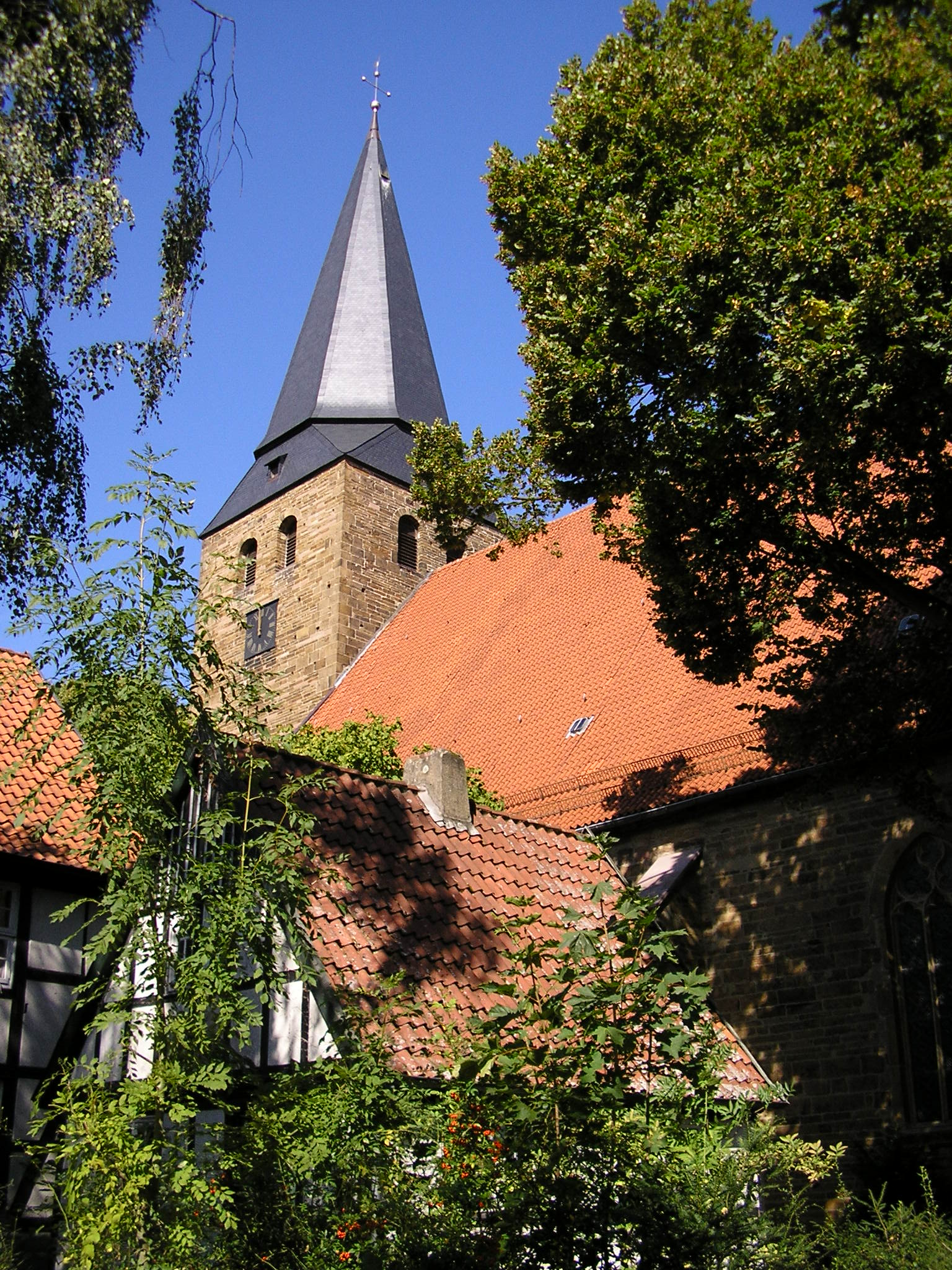 ev.-luth. St. Andreaskirche zu Lübbecke